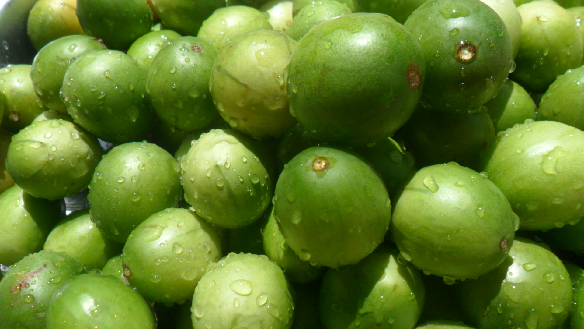 UMBU